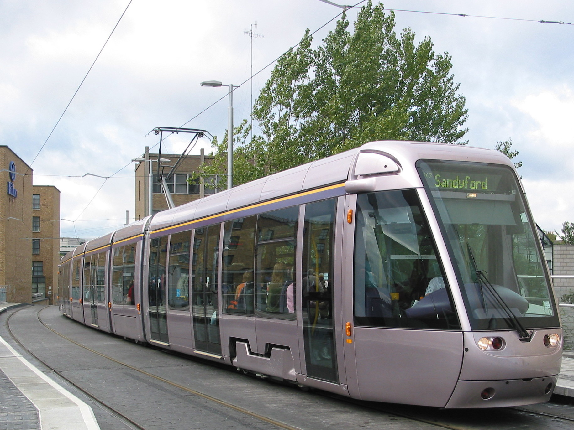 Luas (Typ Alstom Citadis 401) bei Haltestelle Charlemont